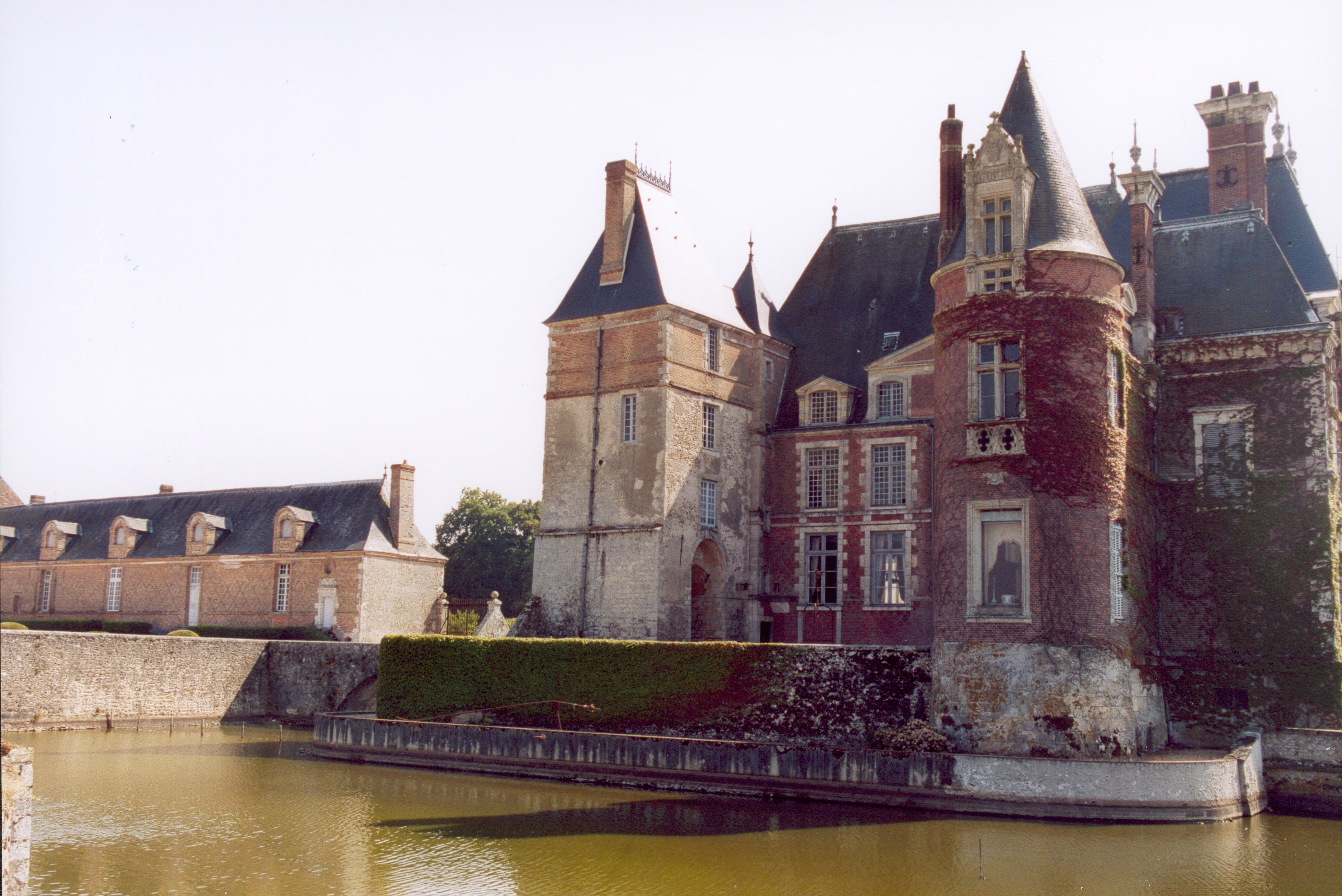 France Loiret La Bussière Le château Photographie prise par GIRAUD Patrick